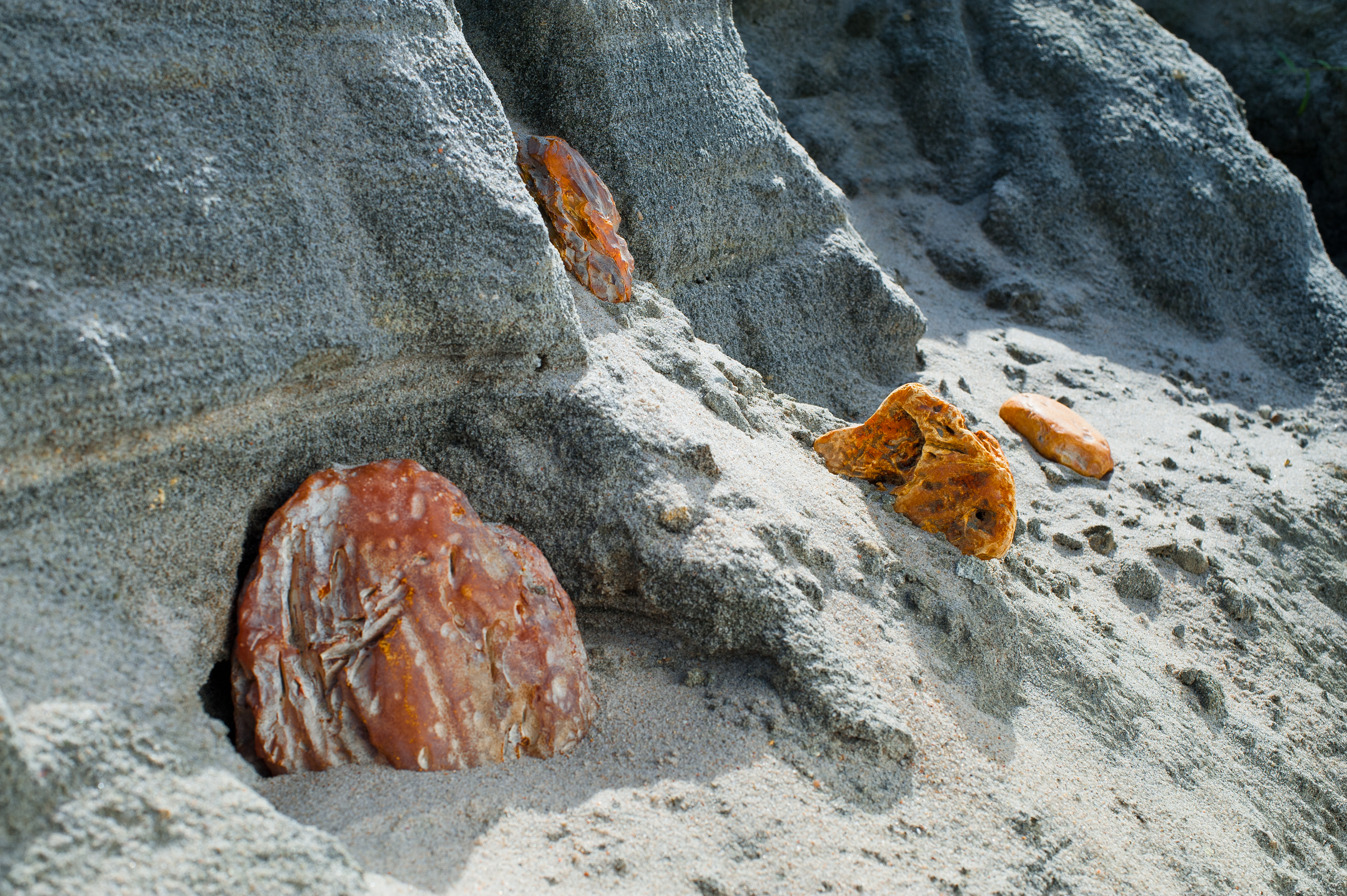 «Голубая земля» и янтарь Приморского карьера Калининградского янтарного комбината